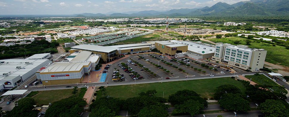 Centro Comercial Guatapuri, Desde el aire.